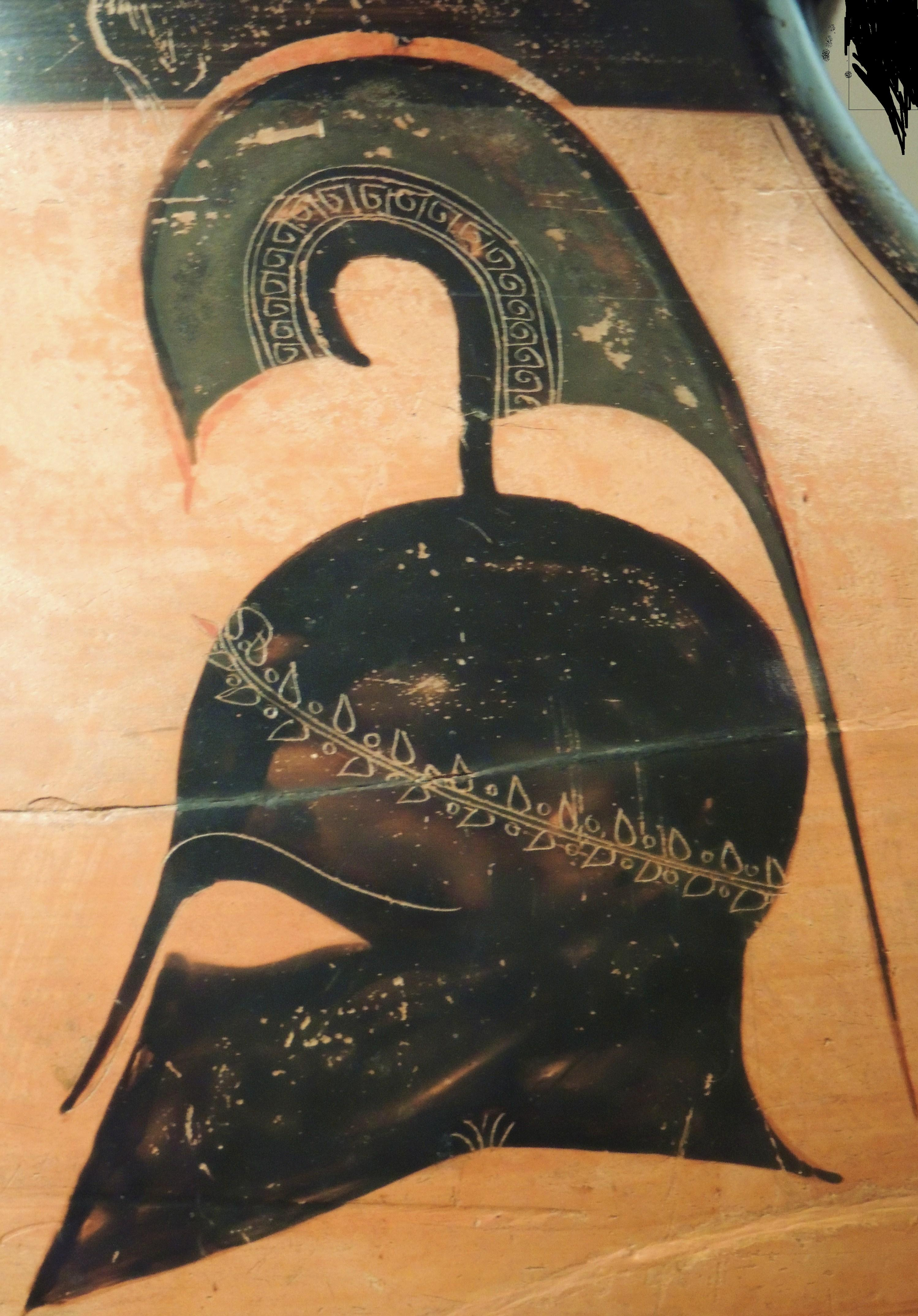 The helm